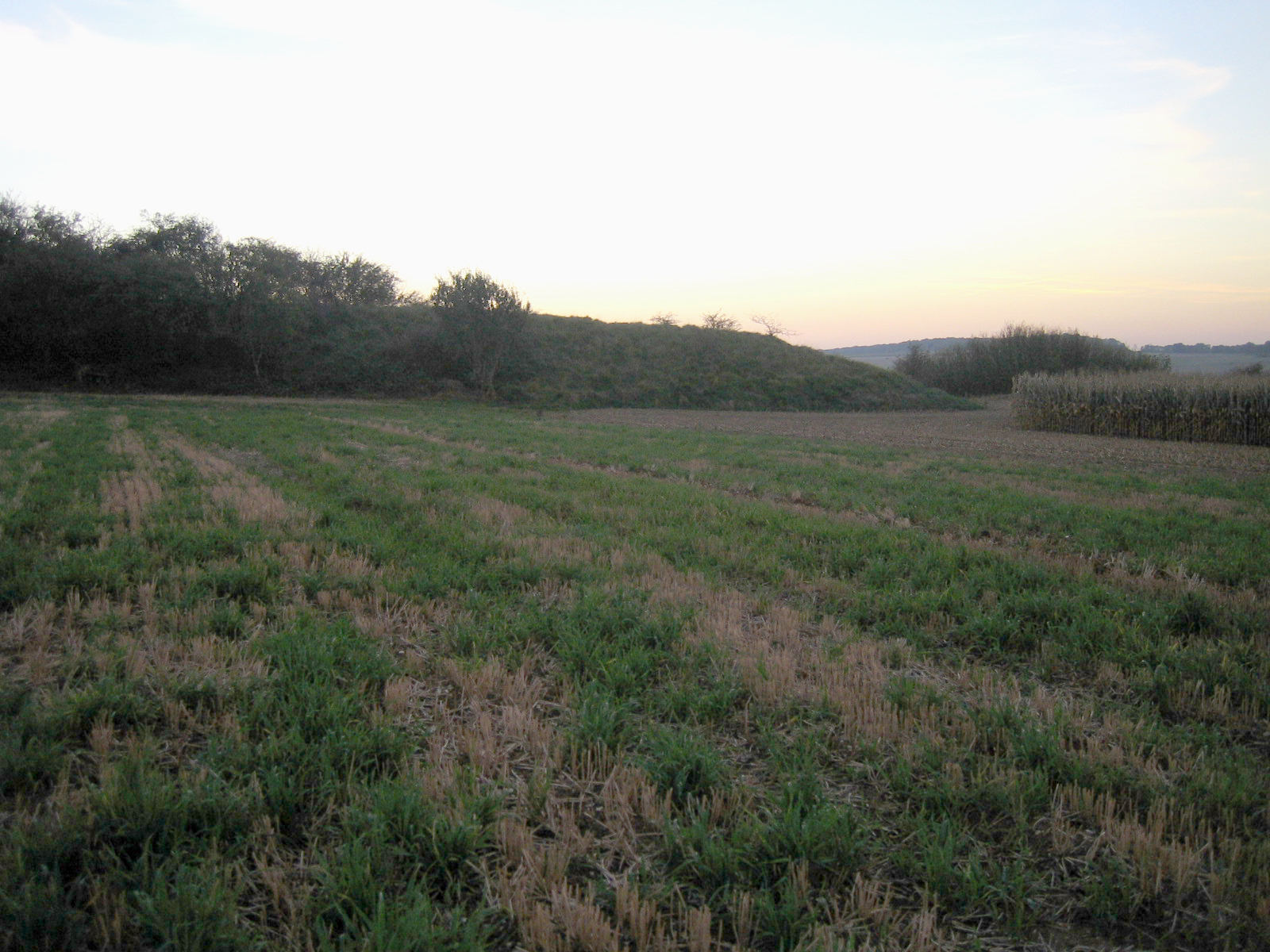 Liercourt (Somme, France) - Terre-plein et talus de l'oppidum. .